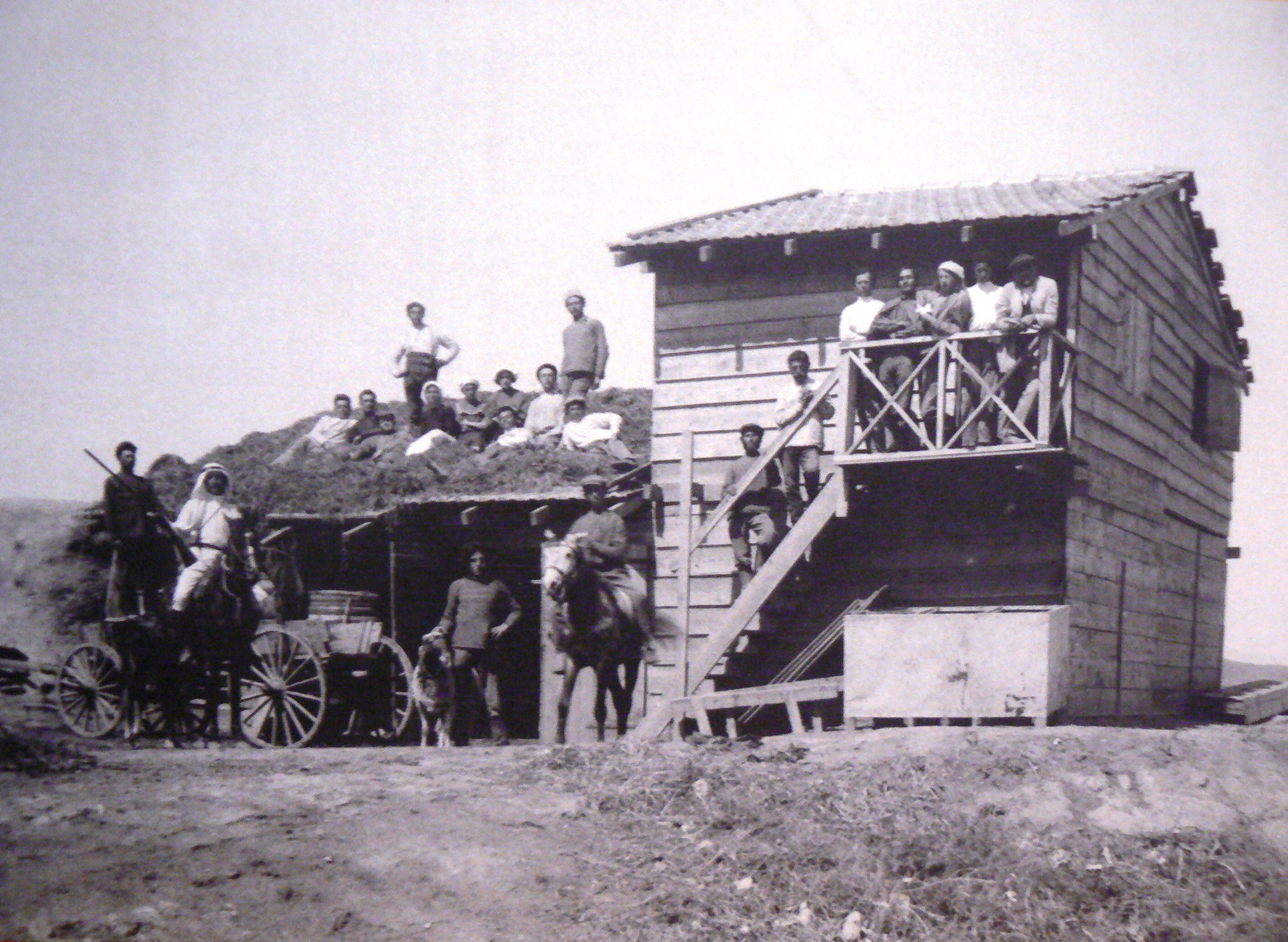 הצריף של הקומונה החדרתית באום ג'וני